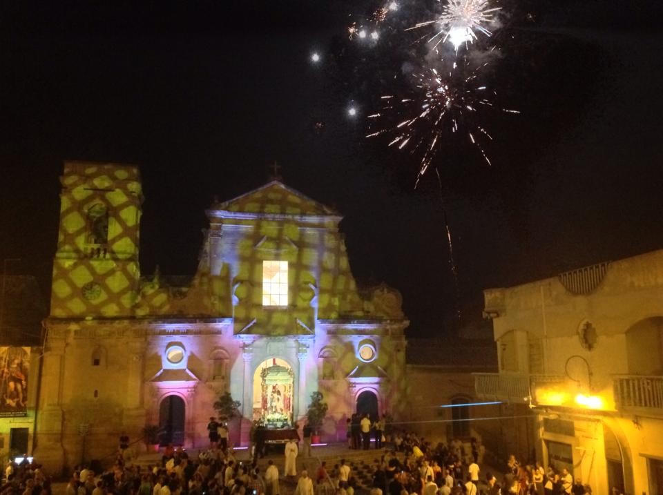 entrata festa san rocco